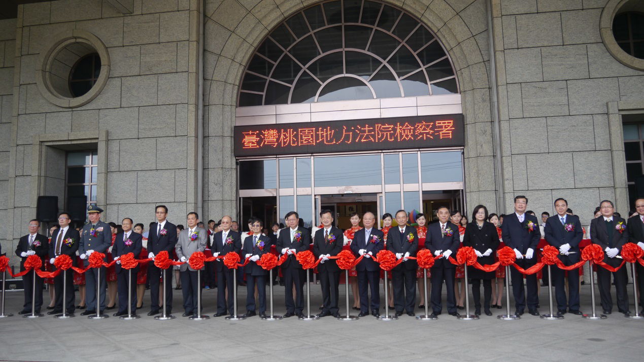 呈現各級官員為臺灣桃園地方法院辦公大樓剪綵的情形。